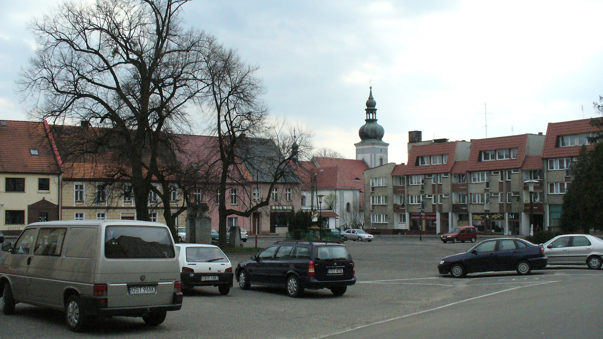 Leśnica - Rynek i kościół